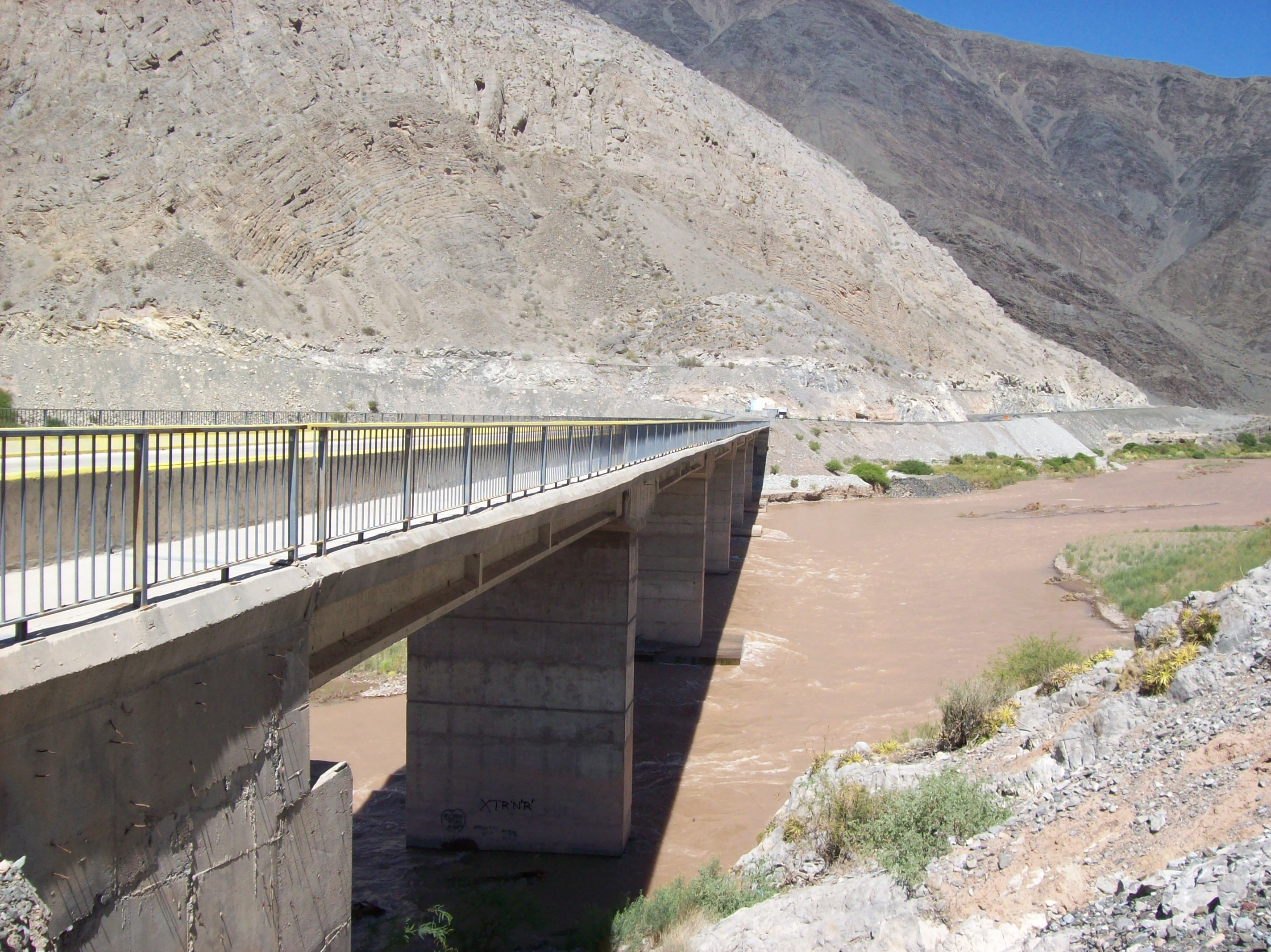 Puente Raúl Suárez sobre el Río San Juan, en Pachaco, Provincia de San Juan, Argentina. La Ruta Nacional 149 pasa por este puente.